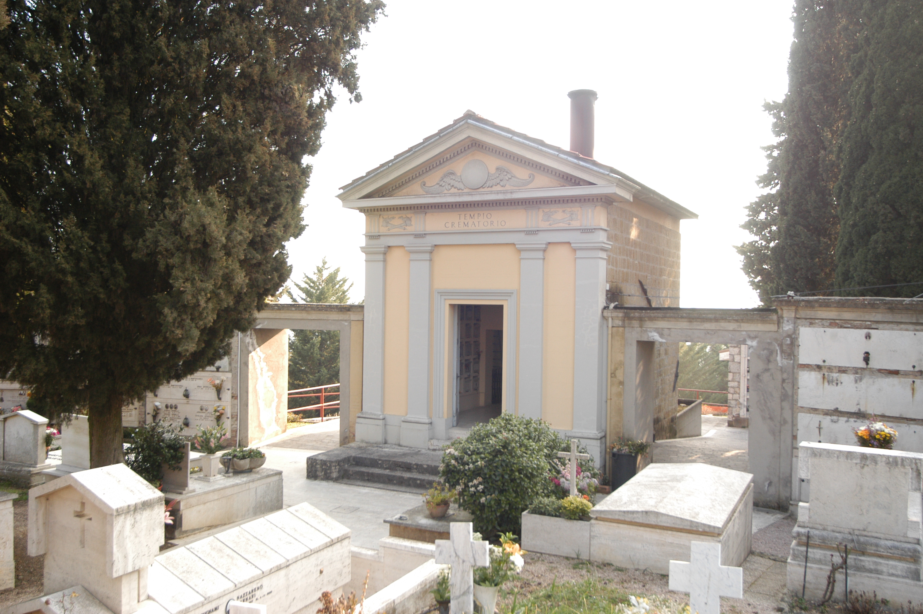 Tempio crematorio del 1895 con cinerario